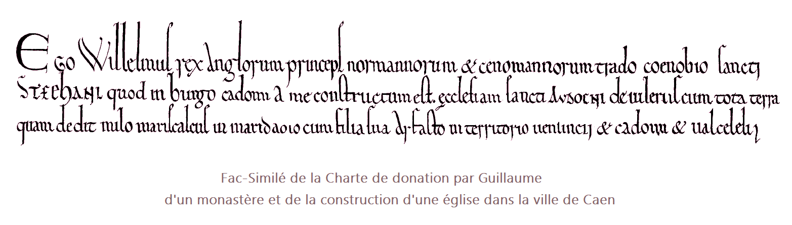 Abbaye Saint-Etienne, Caen, Fac-similé de la charte de donation (image du domaine publis modifiée (M.S.A. Normandie 1834)